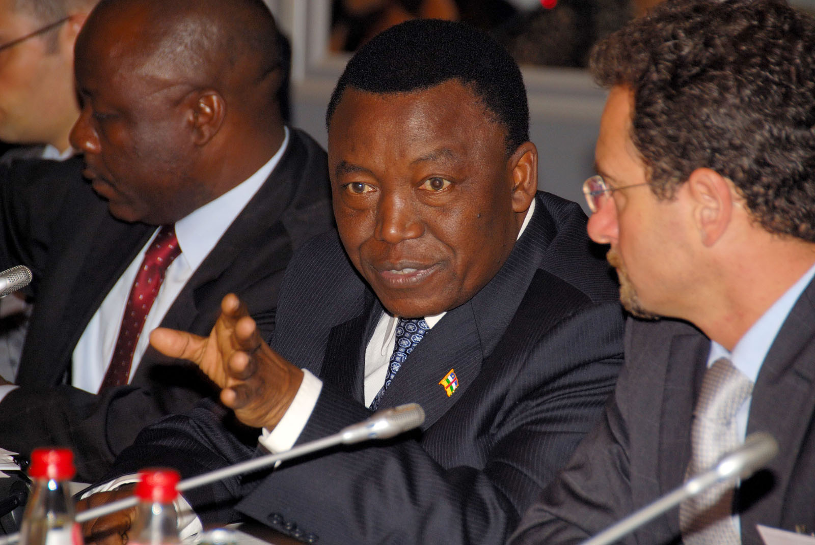 Élie Doté, Premierminister der Zentralafrikanischen Republik von Juni 2005 bis Januar 2008 bei einer Konferenz für Entwicklung am 26 Juni 2007 in Brüssel.